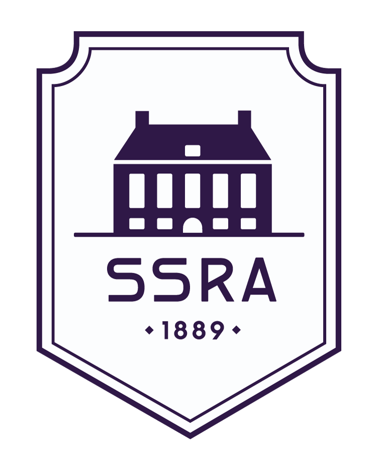 Het logo van SSRA sinds juni 2015. Een weergave van het gebouw Leidsegracht 108